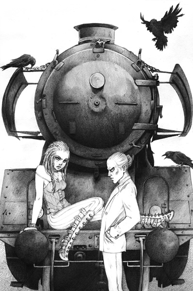 Auszug aus der Mangabuchreihe Krähen von Marie Sann